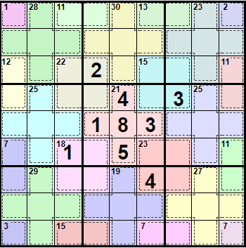 Так вигляадє Кілер судоку